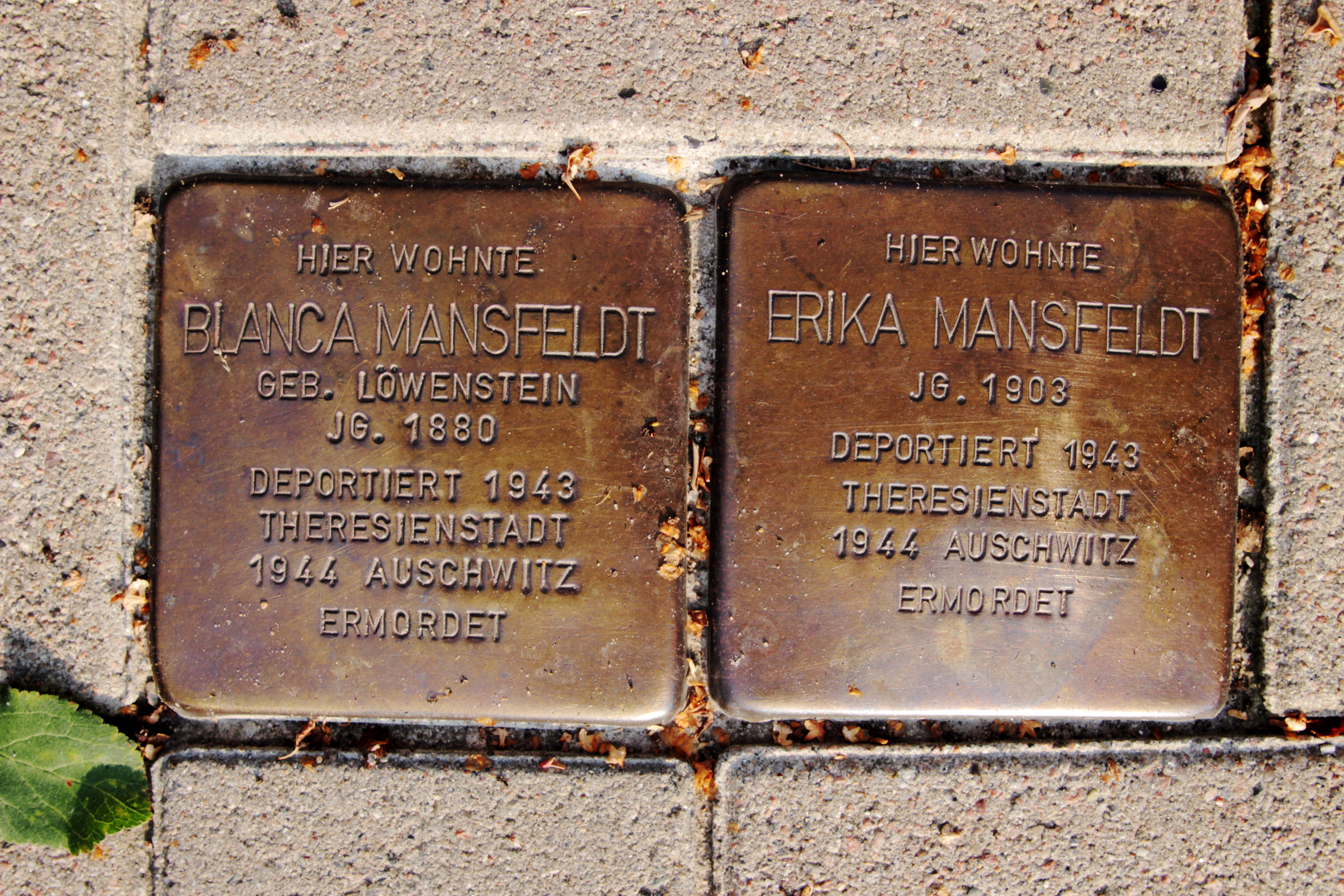 Stolpersteine für Blanca und Erika Mansfeldt im Heckkatenweg 2 in Hamburg-Bergedorf am 17. August 2020